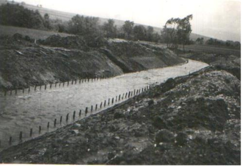 Regulacja czarnego potoka